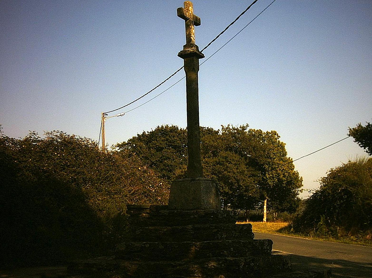 Cruceiro de San Xiao, Zas do Rei, Melide.